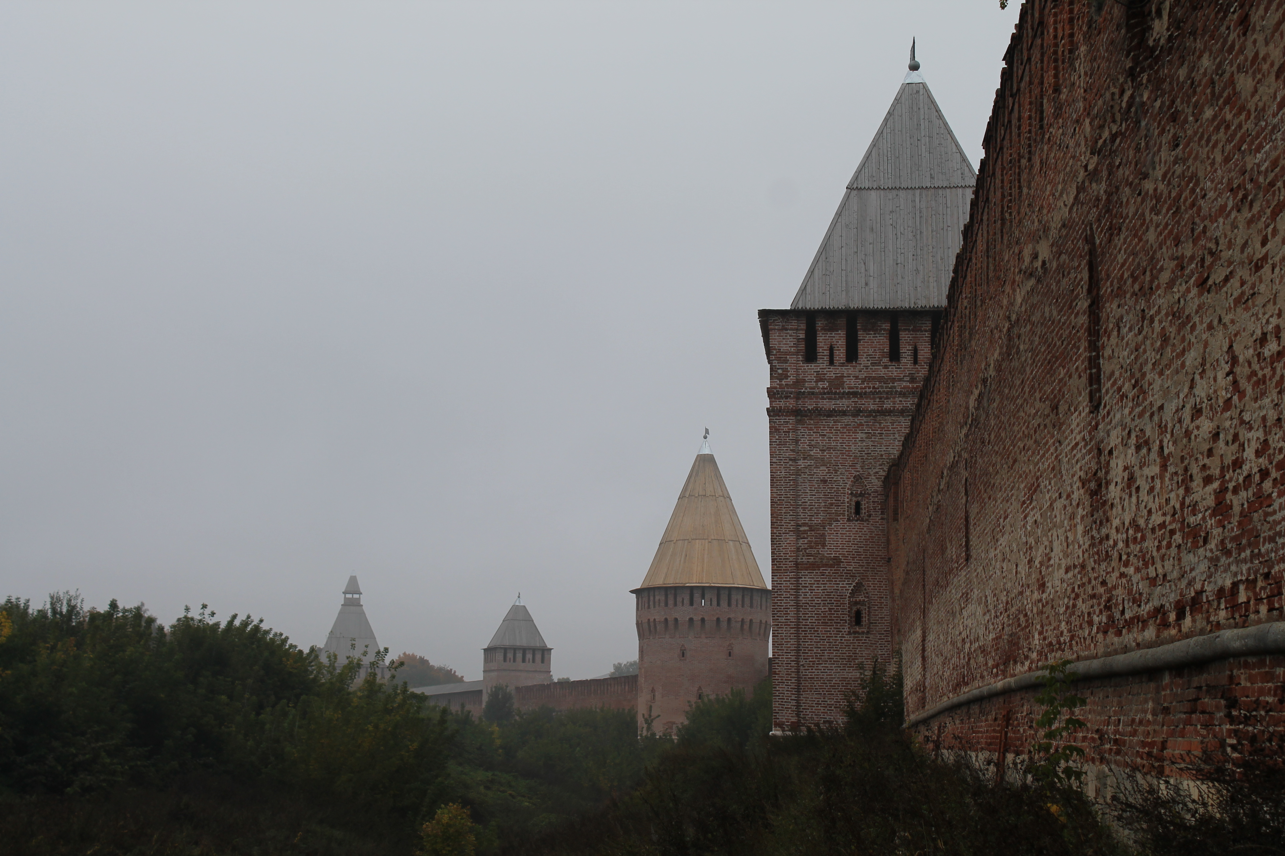 Башня Воронина (Смоленская область, Смоленск, сквер Памяти героев, Маршала Жукова улица, Октябрьской Революции улица, Соболева улица, Студенческая улица, Тимирязева улица, центральный парк культуры и отдыха)